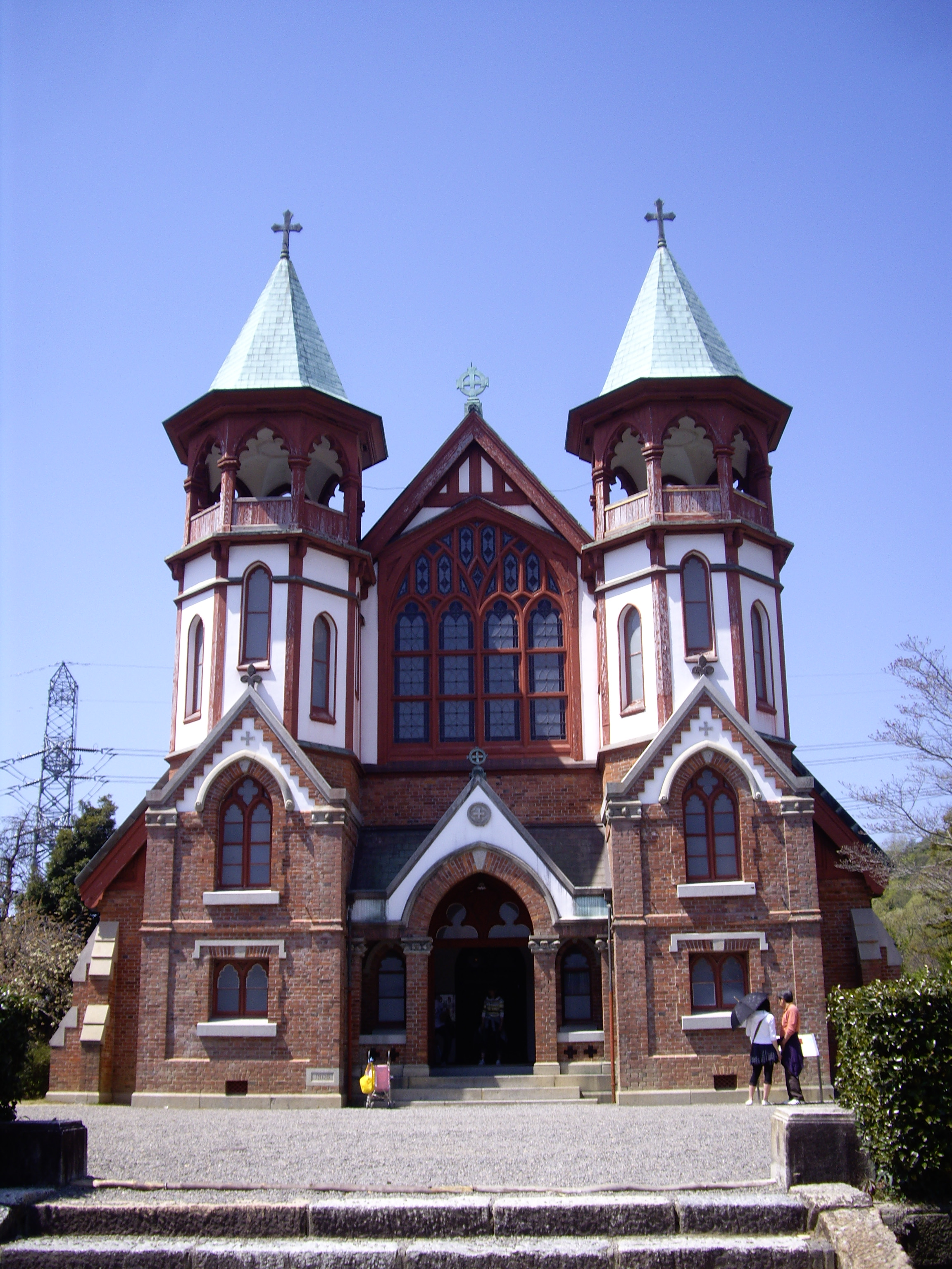 Meiji Mura